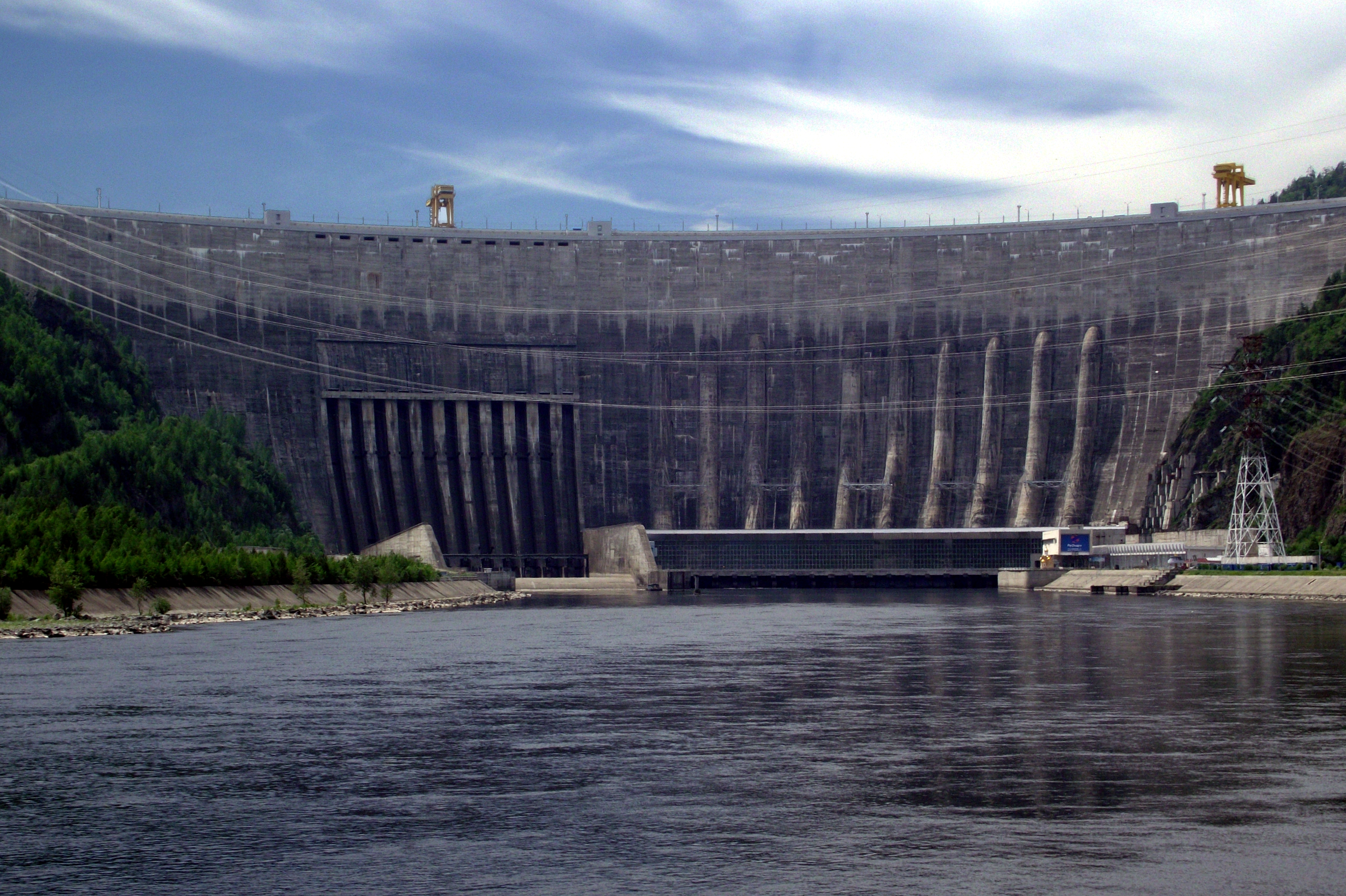 Саяно-Шушенская ГЭС